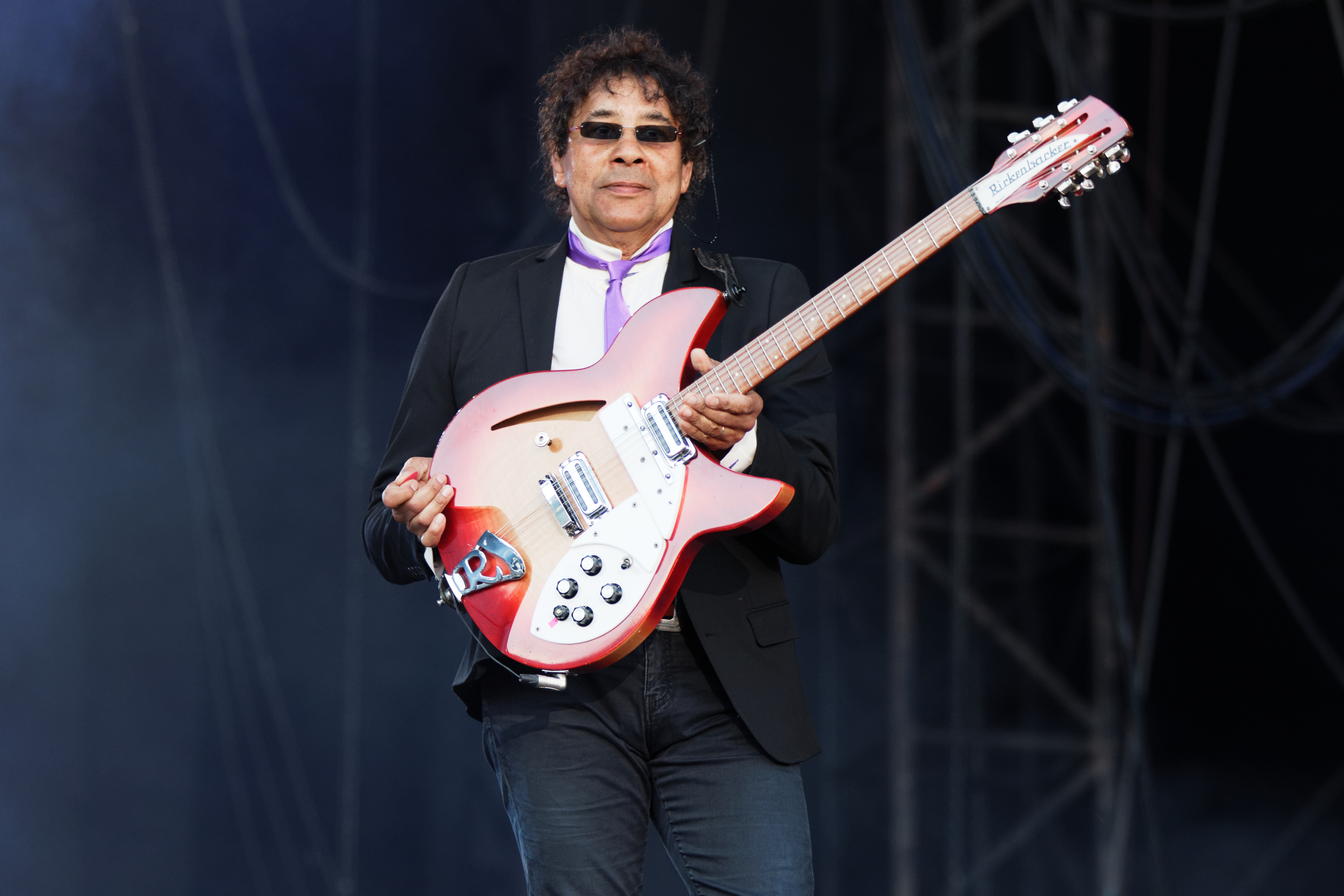 Alain Souchon et Laurent Voulzy en concert lors du festival des vieilles charrues 2016.